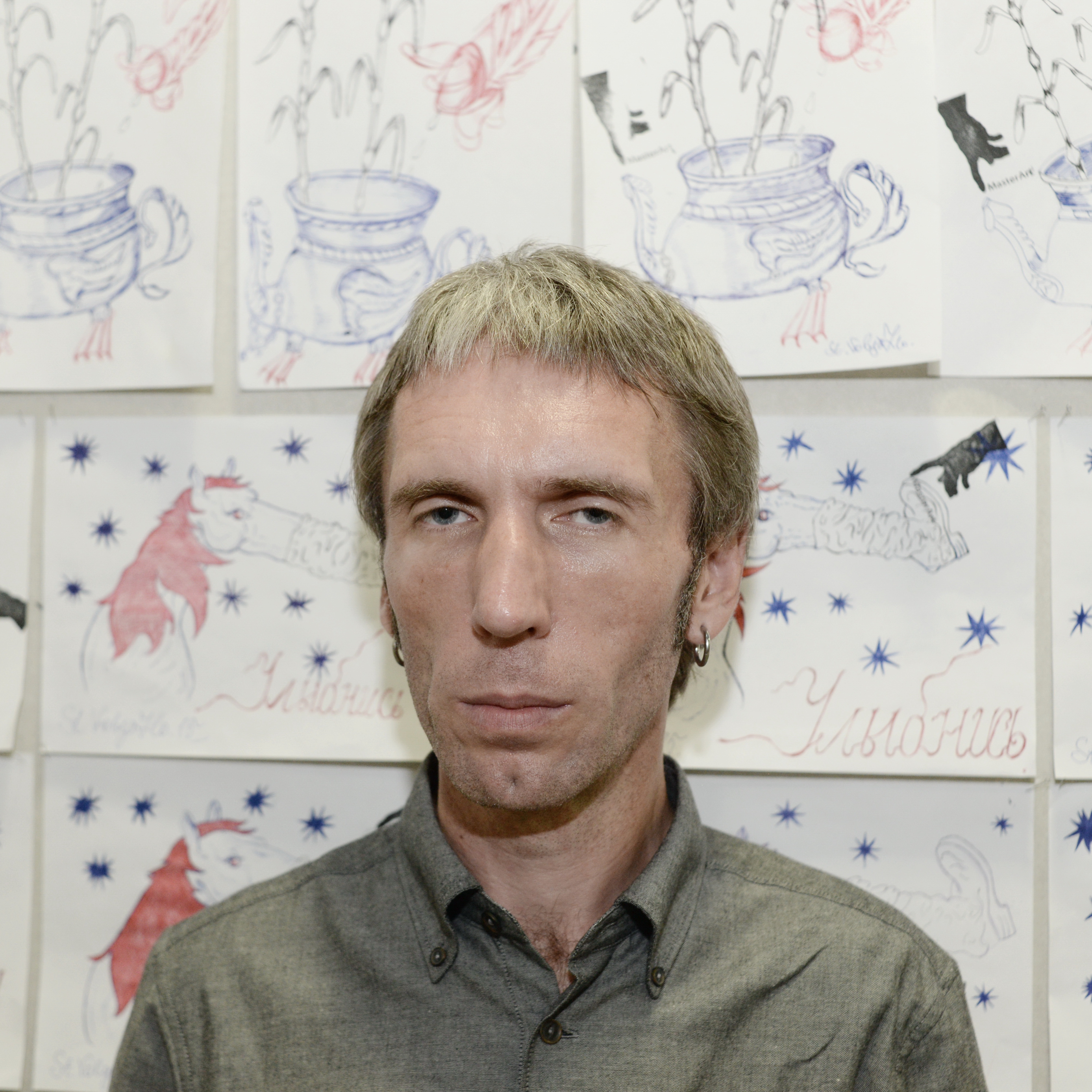 Стас Волязловский на коллективной выставке Master Art в Vozdvizhenka 32 Art House